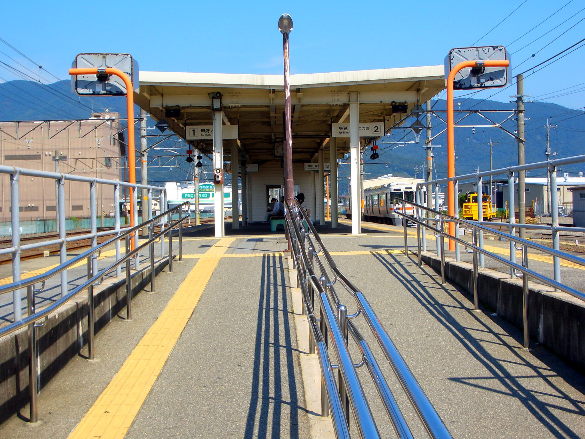 南甲府駅